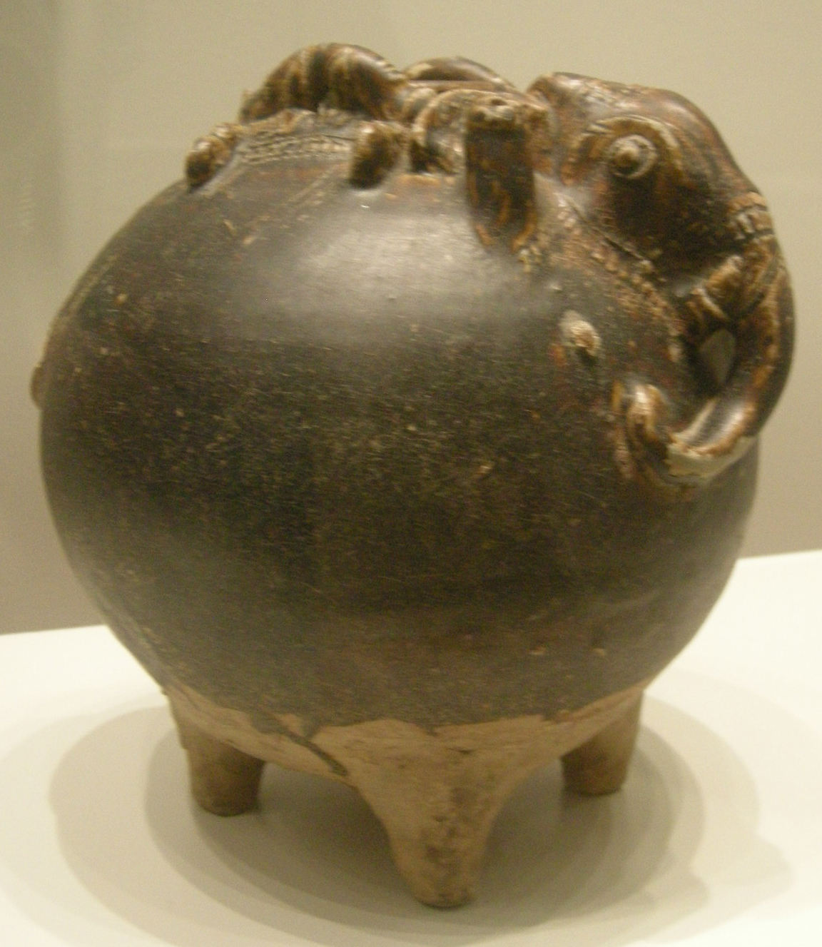 cambogia, giara a forma di elefante, XI-XII sec